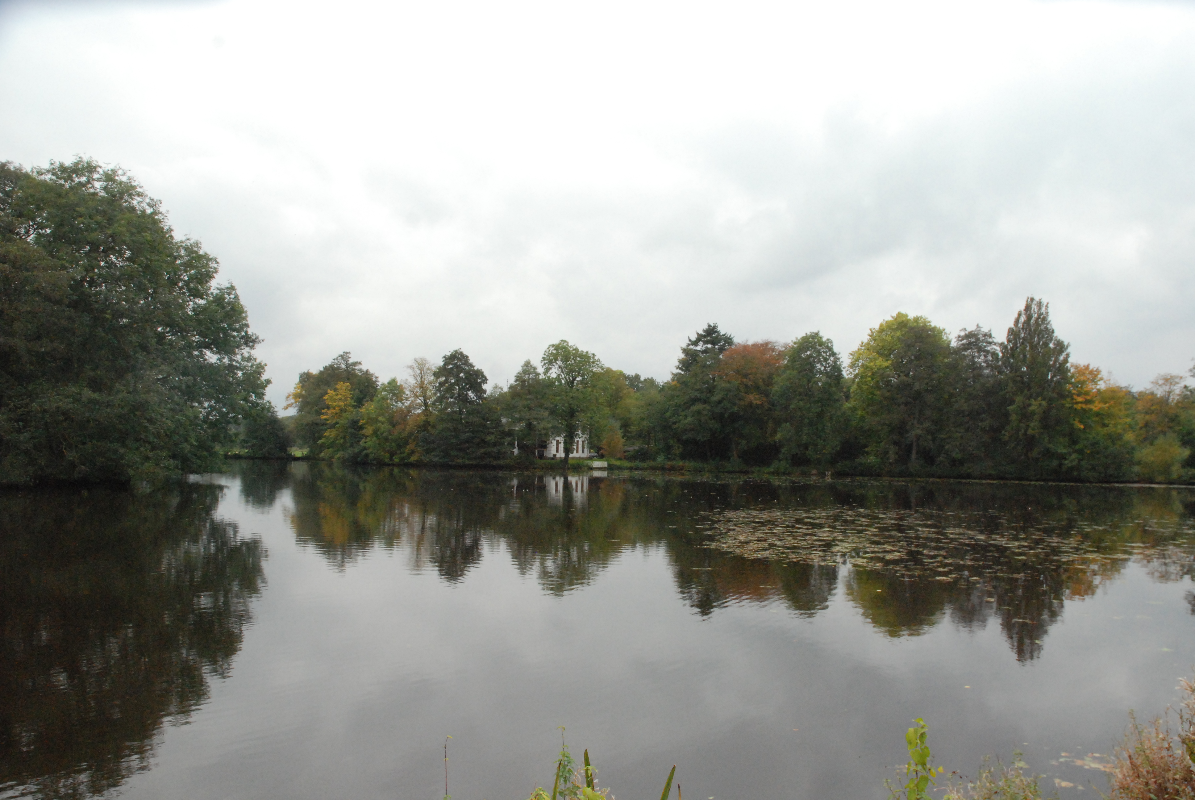 Gutsinsel mit Gutshaus